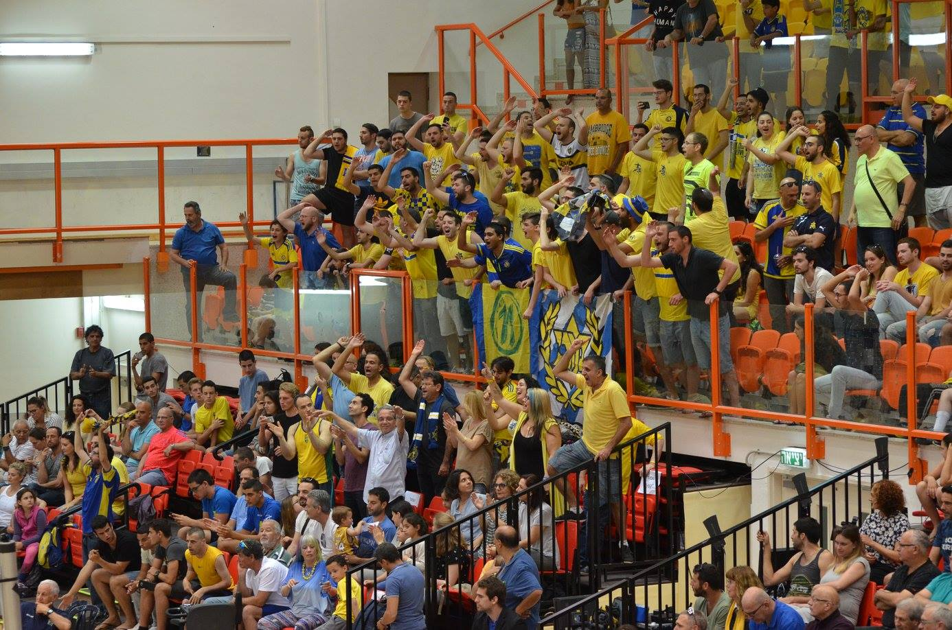 אוהדי מכבי תל אביב בכדורעף